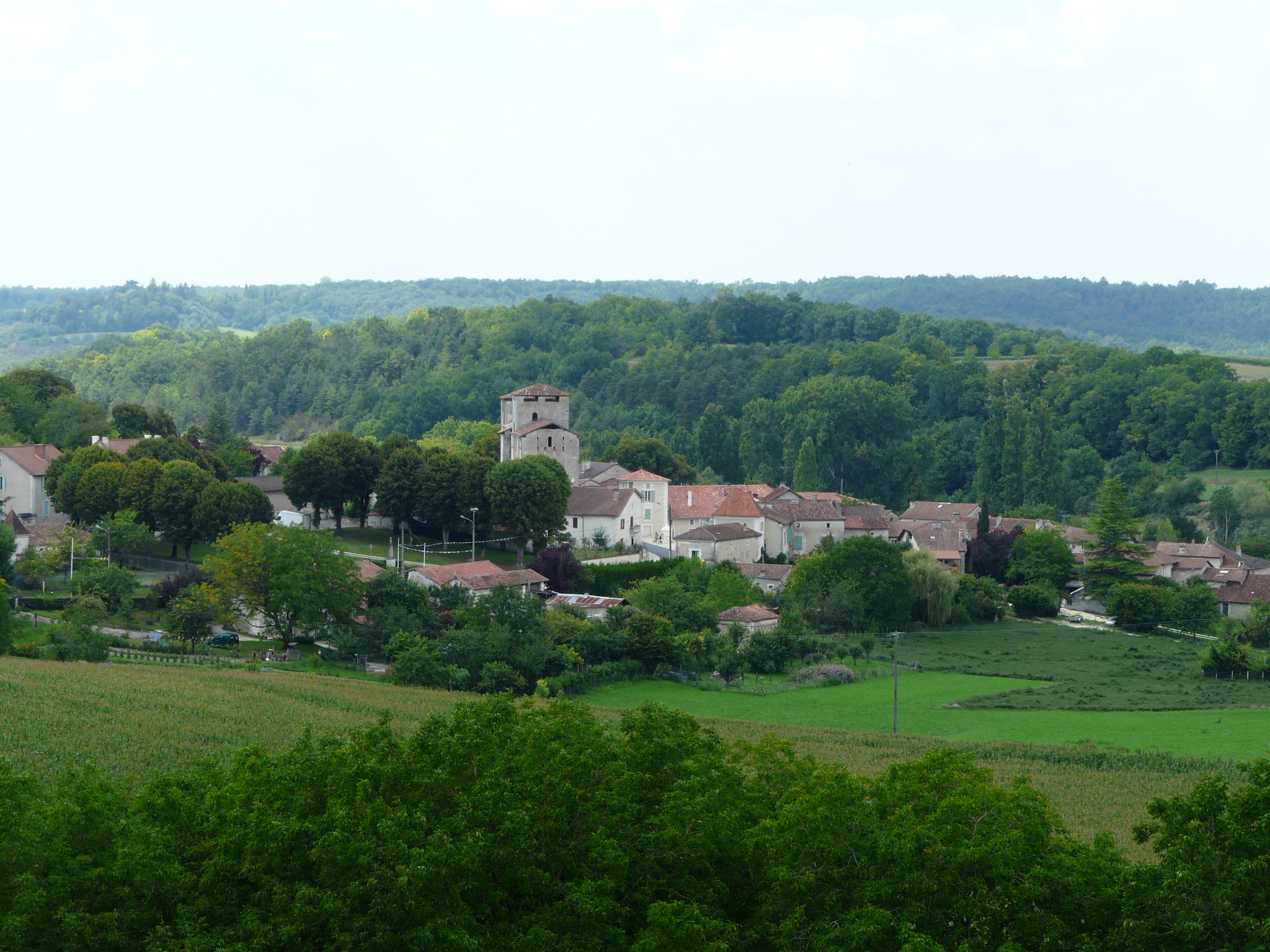 Le village de Grand-Brassac vu depuis l'est, Dordogne, France.